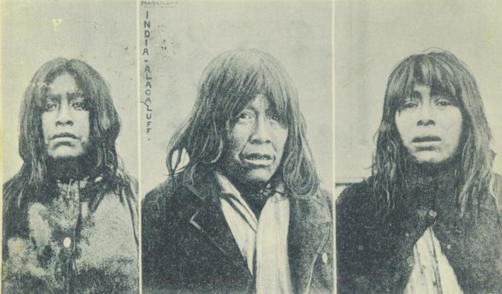 Indias Alacalufes, Magallanes (Chile)